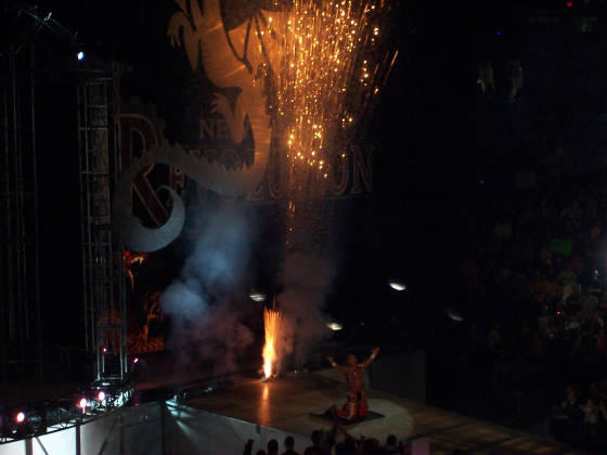 HBK